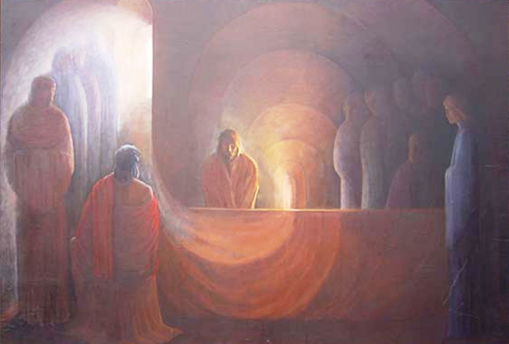 Живописное полотно.Масло.1997 г.